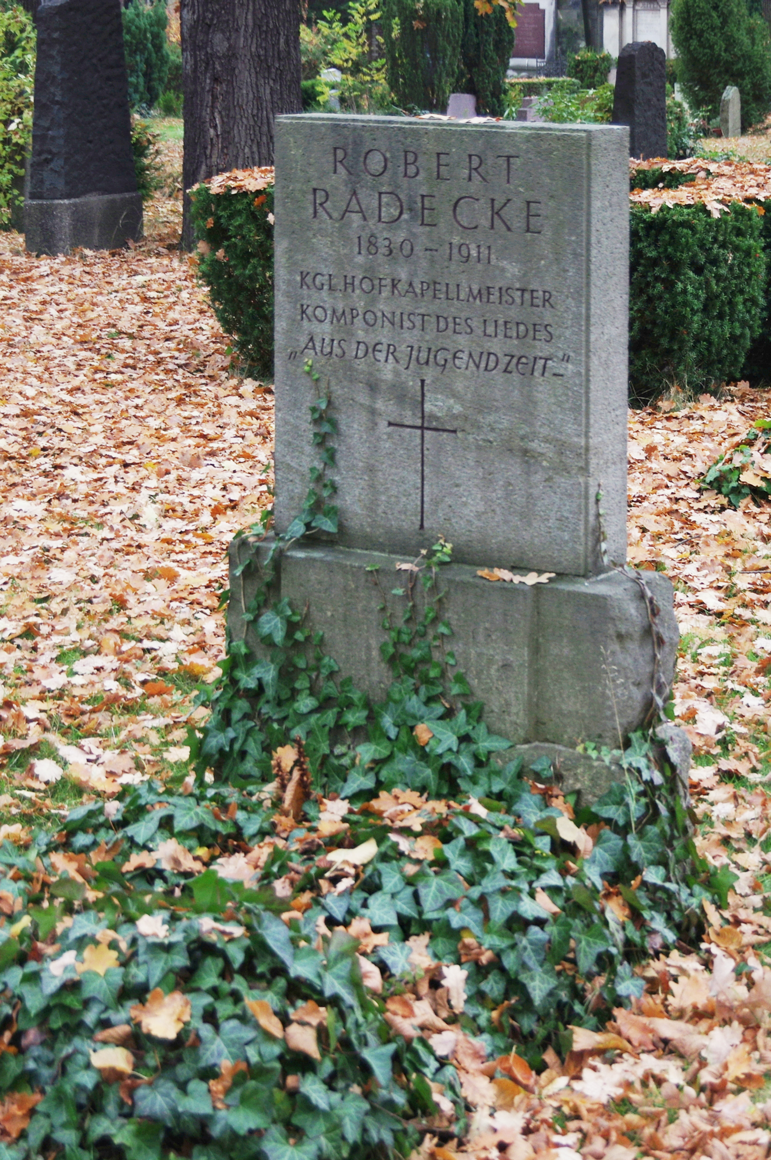 Der Alter Zwölf-Apostel-Kirchhof in Berlin-Schöneberg. Der Friedhof ist denkmalgeschützt.